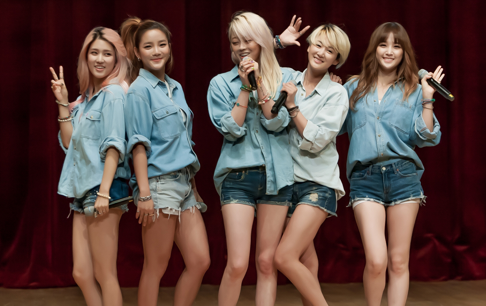 130927 건국대학교 job콘서트 스피카 by. 달덩이 (색보정)